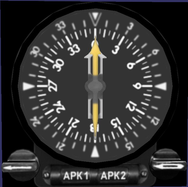 Пример ИКУ как прибора из комплекса АРК